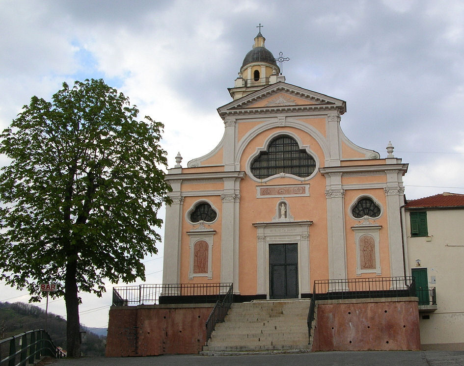 Foto propria Chiesa San Biagio (Bolzaneto - Genova)